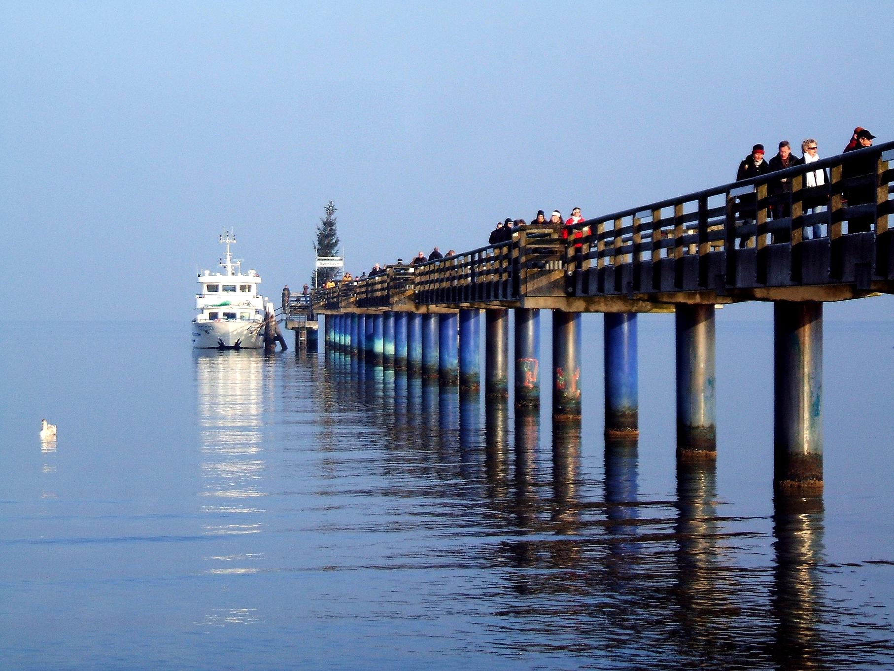 Ostseebad Boltenhagen; Seebrücke, Schiff und Schwan